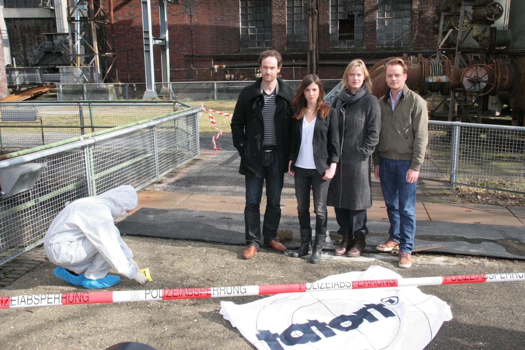 Kriminalhauptkommissar Peter Faber (Jörg Hartmann), Kriminaloberkommissarin Nora Dalay (Aylin Tezel), Kriminalhauptkommissarin Martina Bönisch (Anna Schudt), Kriminaloberkommissar Daniel Kossik (Stefan Konarske) v.l.n.r.